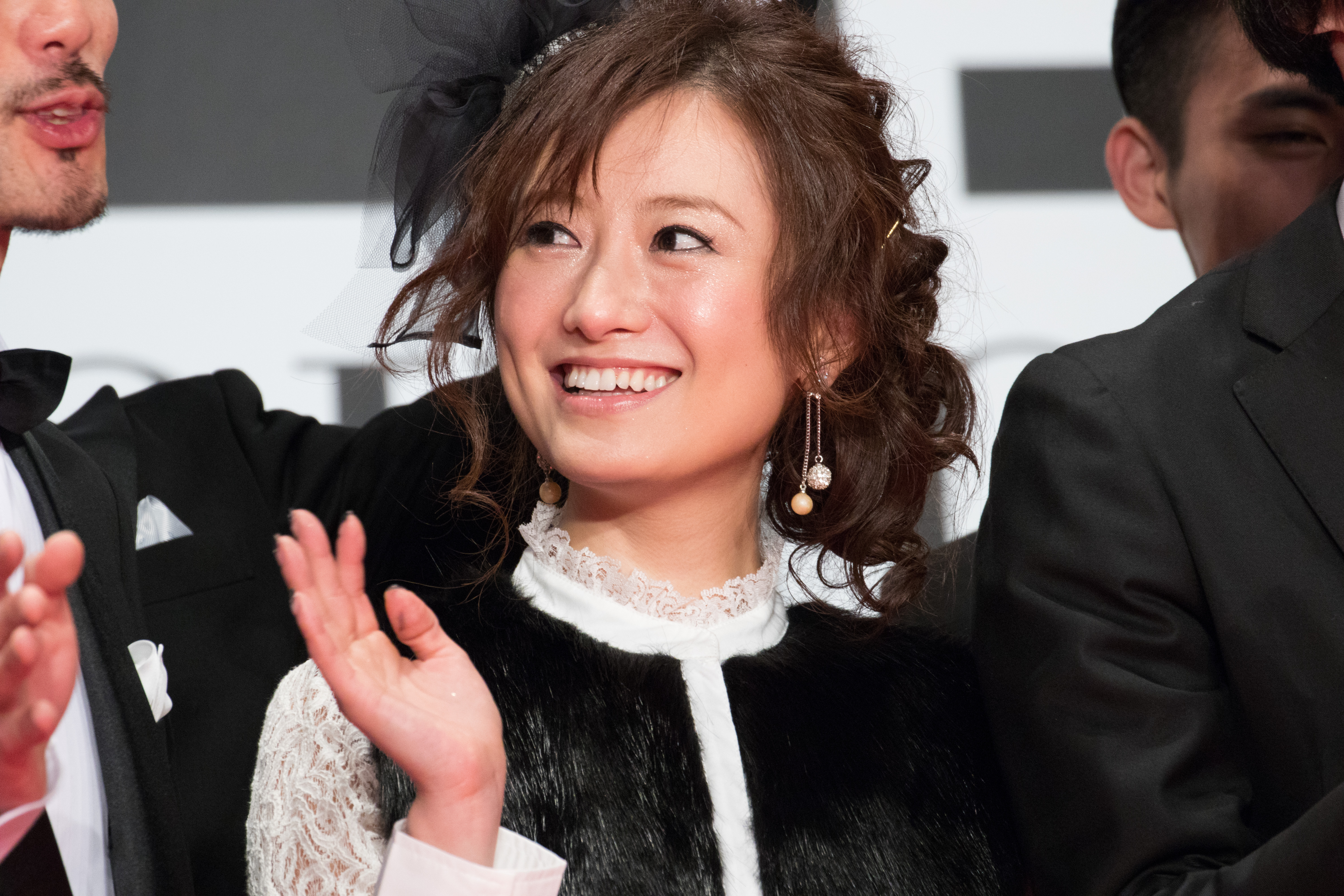 第29回 東京国際映画祭 オープニングセレモニー 松本まりか (退屈な日々にさようならを)